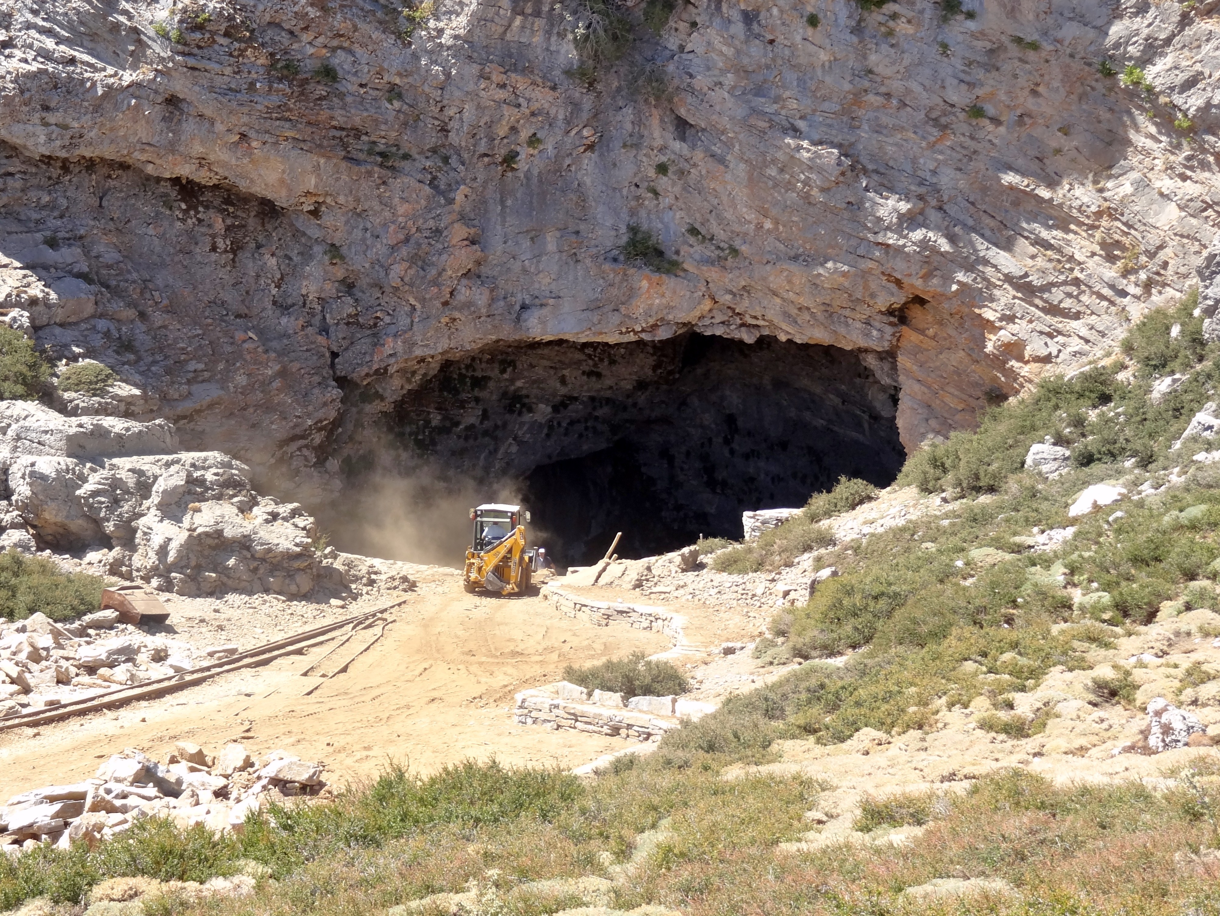 Idäische Grotte an der Nida-Hochebene, Gemeinde Anogia, Regionalbezirk Rethymno, Kreta, Griechenland